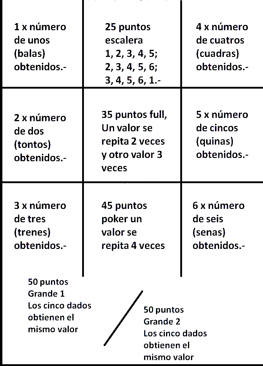 Tablero de Jugada de Mano